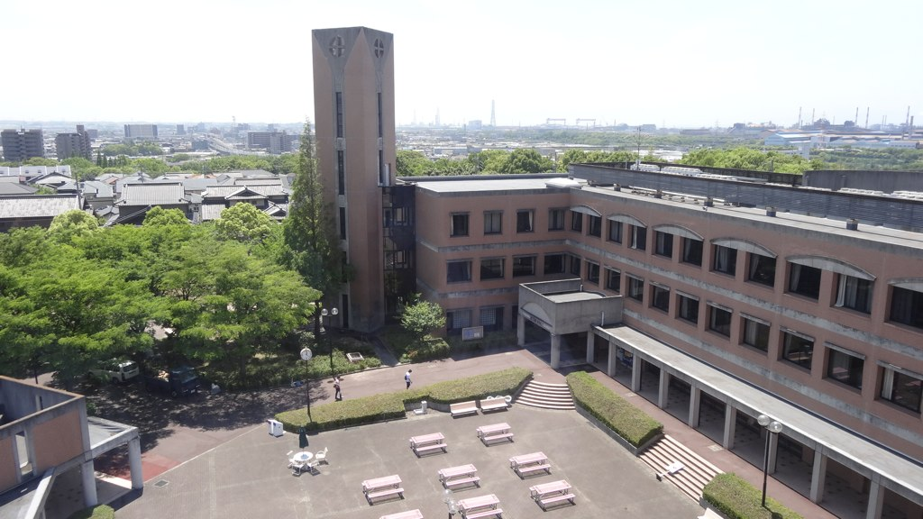 名古屋石田学園星城大学